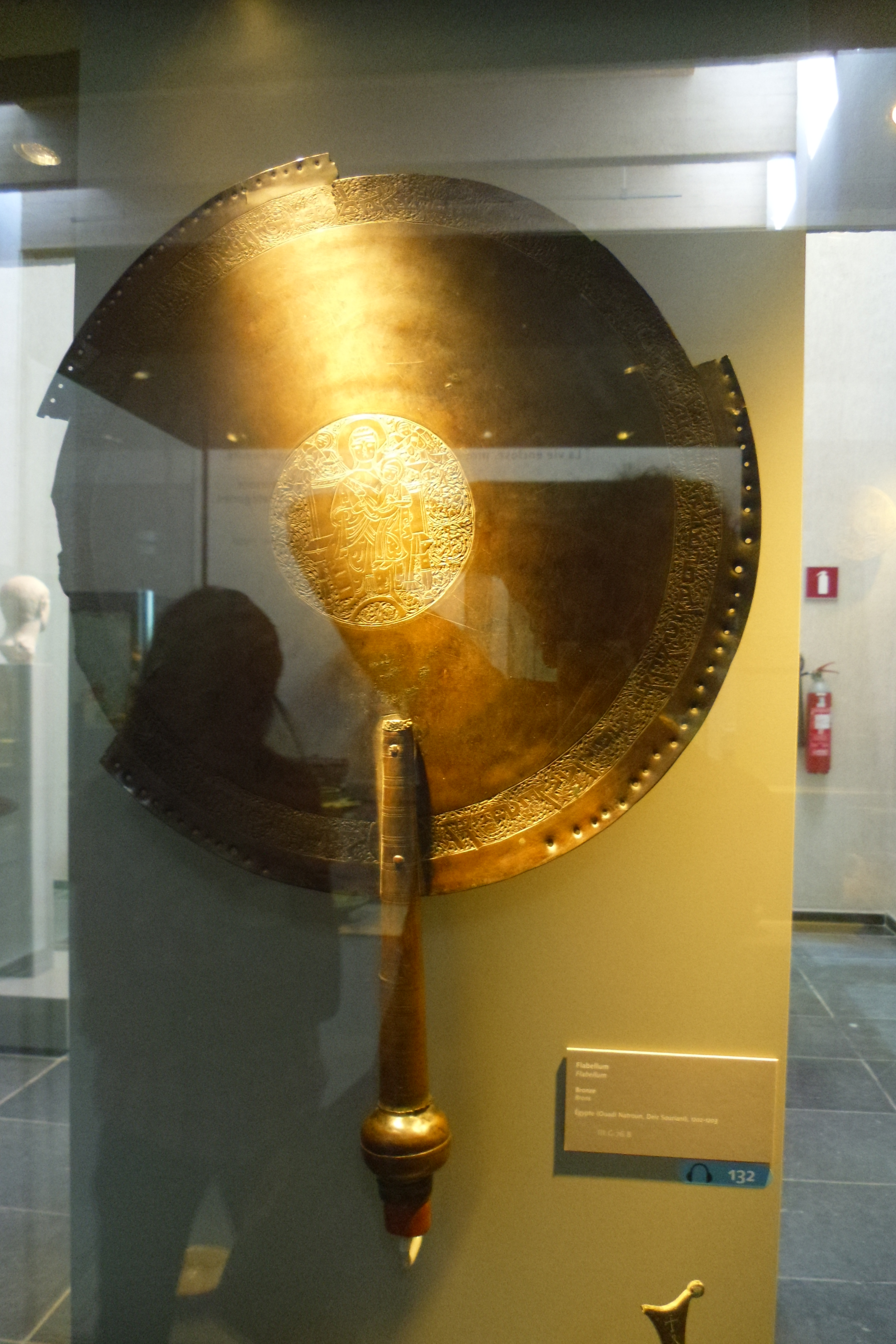 Flabellum en bronze avec inscription syriaque. Égypte, Wadi Natroun, XIIIe siècle. This is a file created at the museum: Musée royal de Mariemont in Morlanwelz